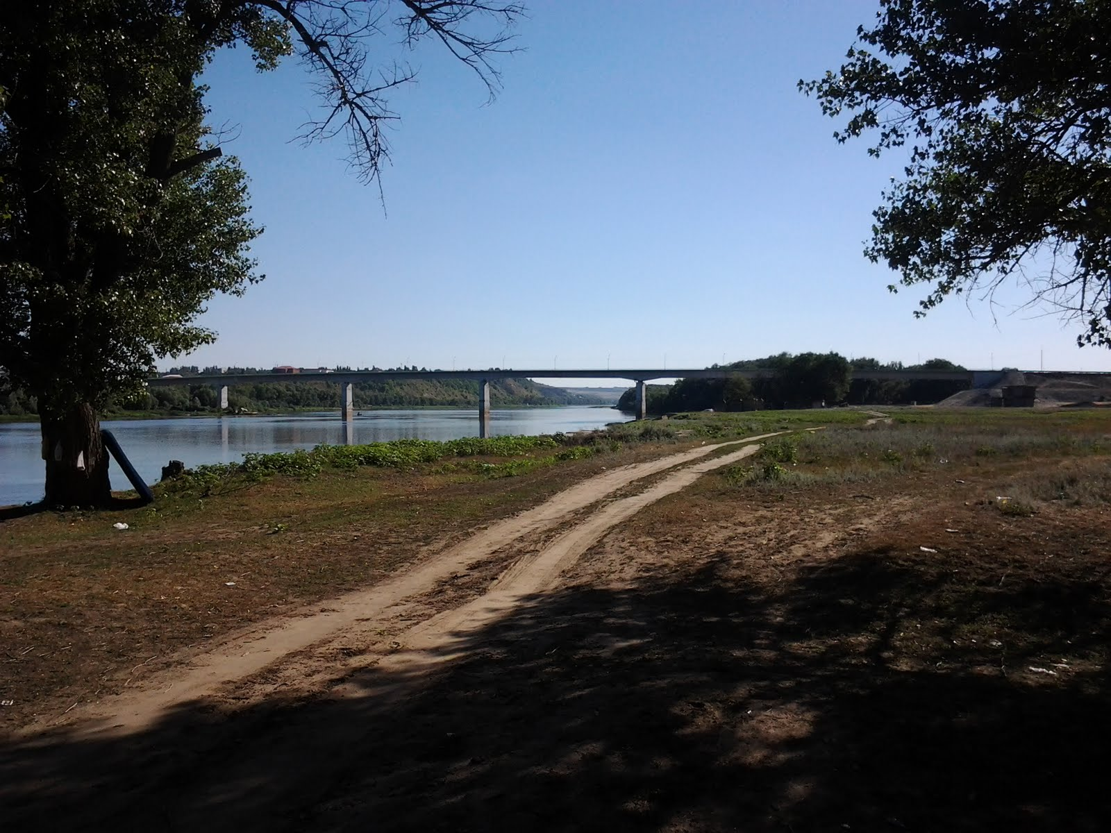 Serafimovichsky District, Volgograd Oblast, Russia